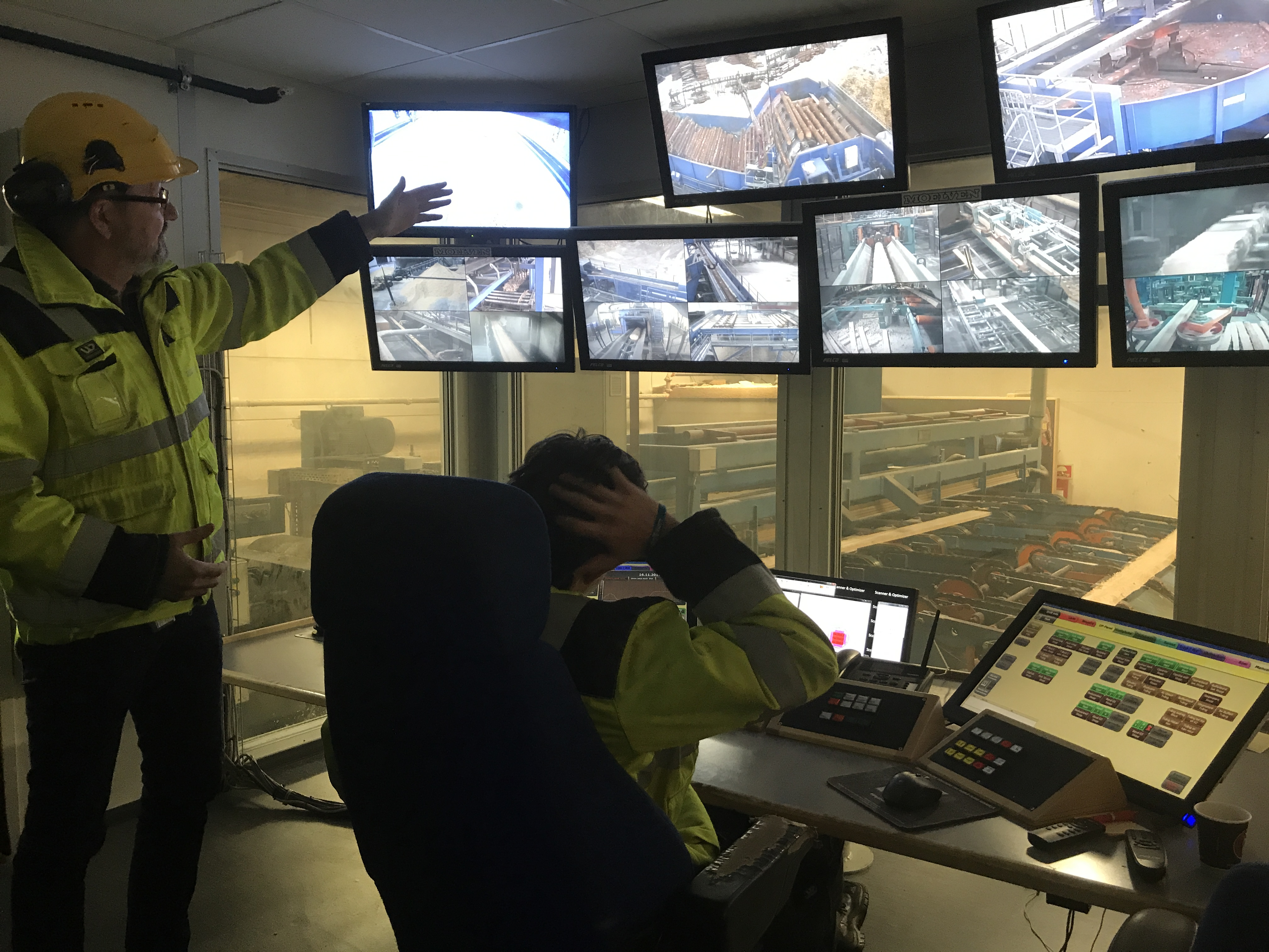 Maskinrommet ved Moelven Mjøsbruket, Biri.